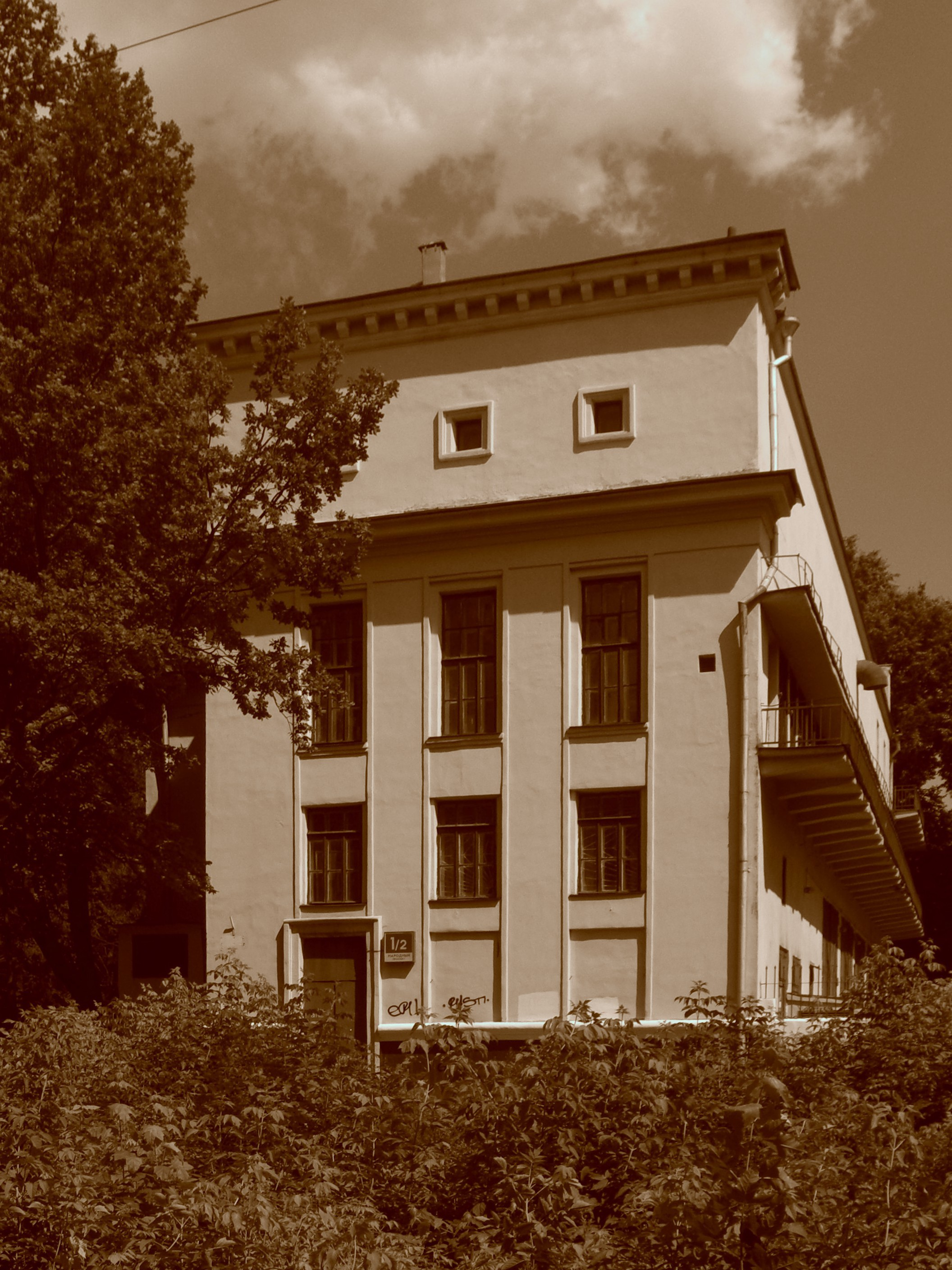 Здание трансформаторной подстанции метрополитена в Измайловском парке в Москве.